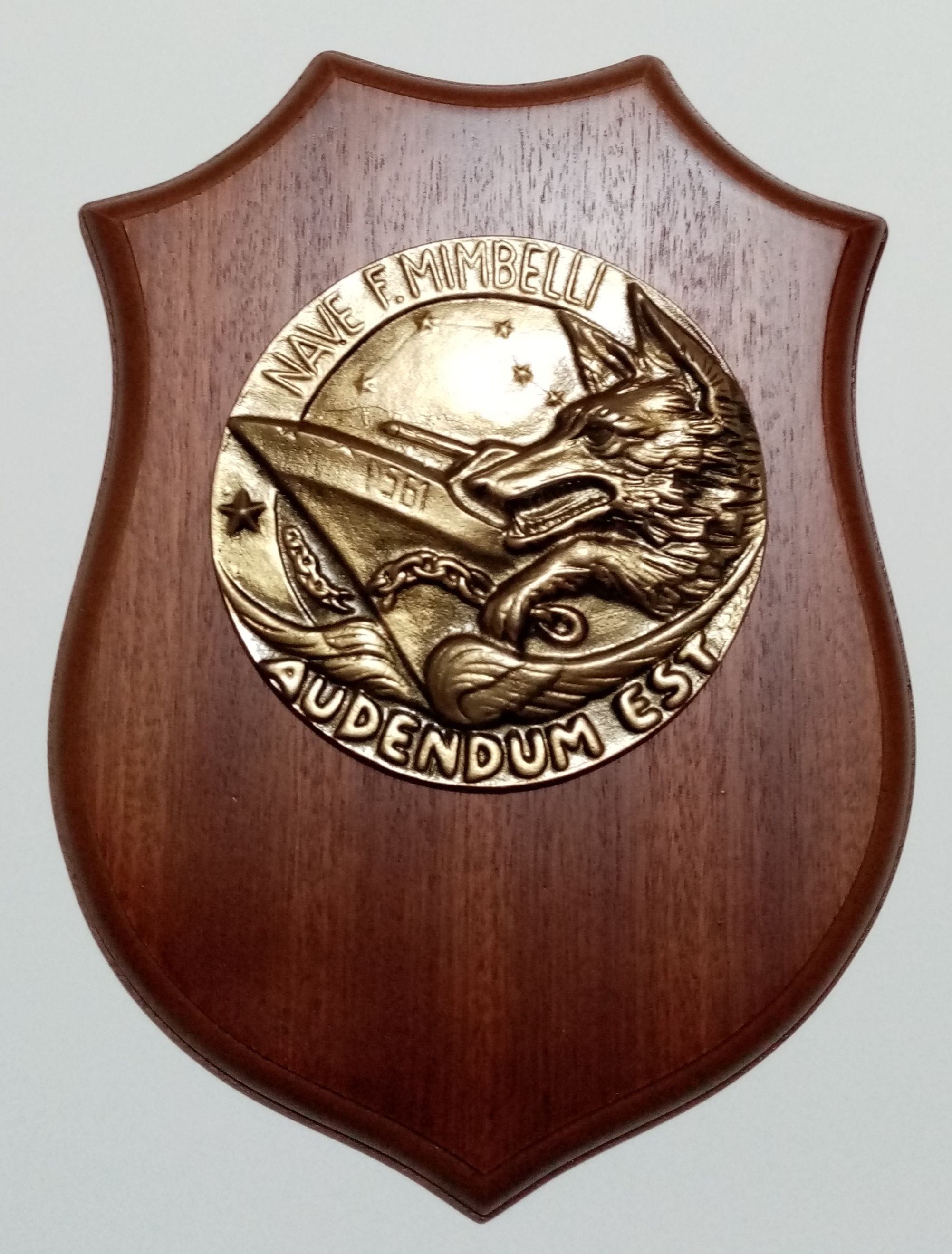 Crest di Nave Francesco Mimbelli (D561)